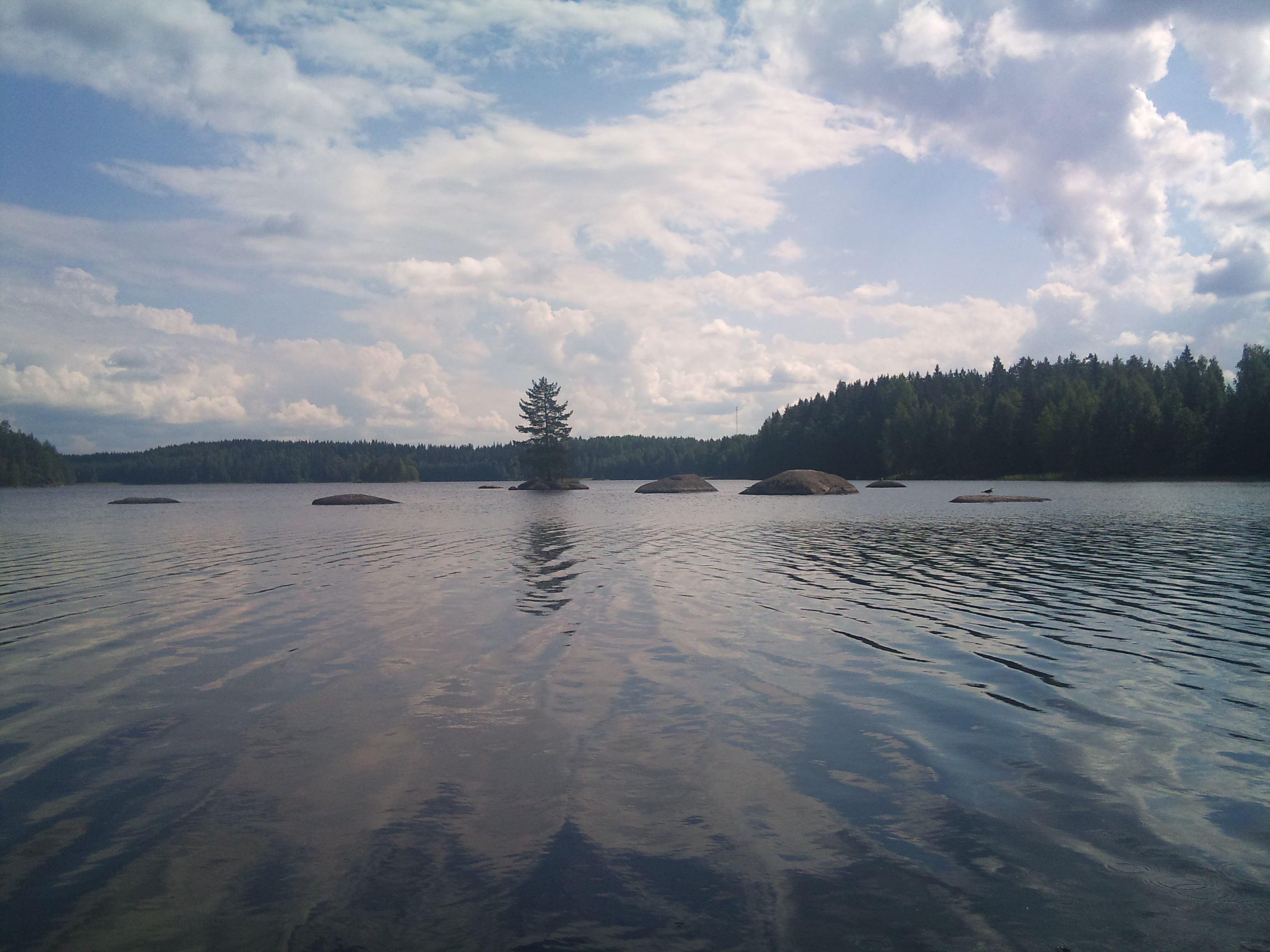 Kivijärvi Stonelake